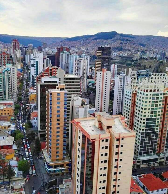 Edificios de la paz en Cotahuma